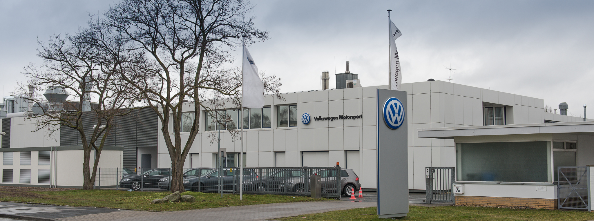 Teilgebäude des Firmensitzes von Volkswagen Motorsport in Hannover